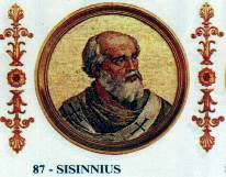 Pope Sisinnius